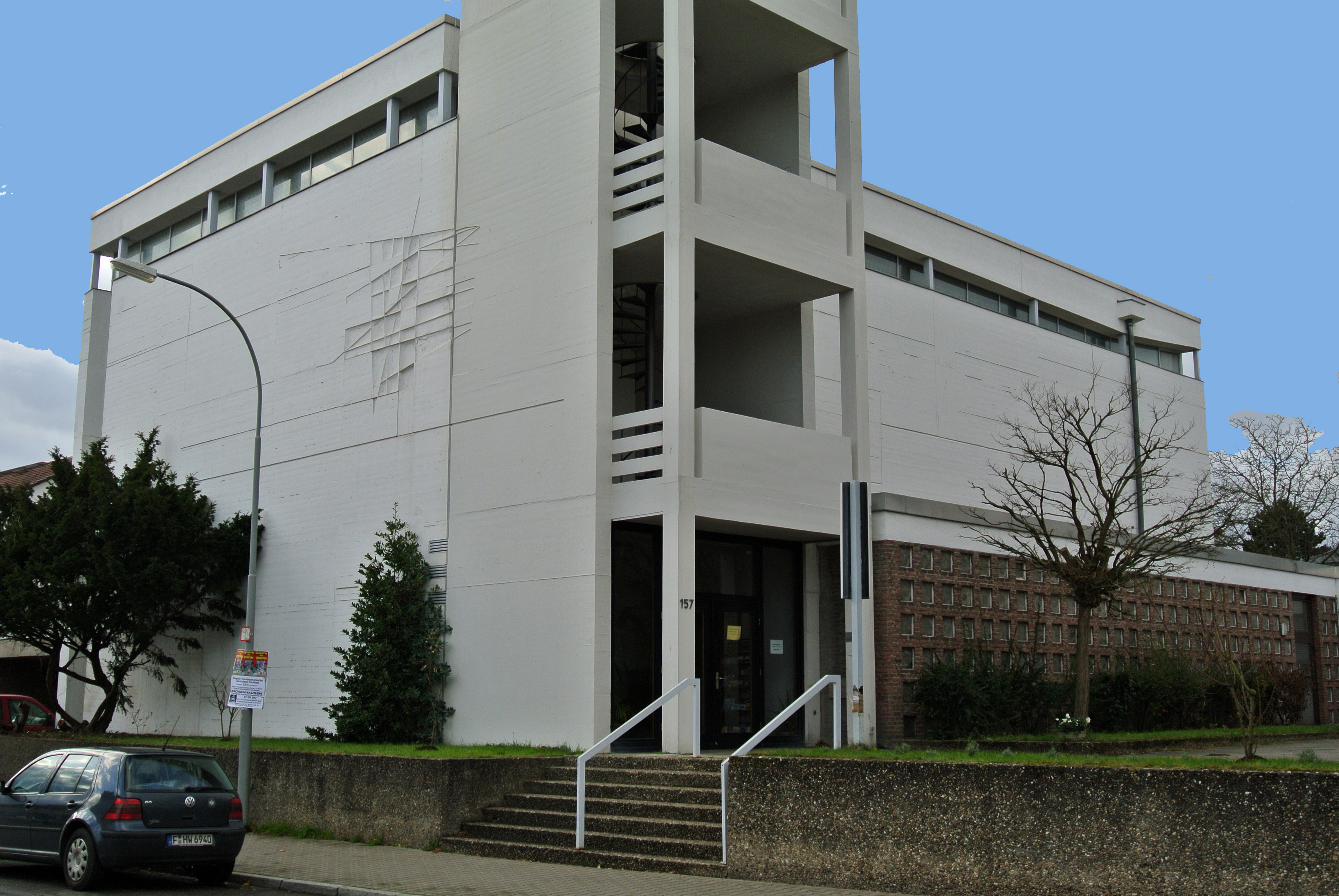 Evangelische Bergkirche, Architekt: Werner W. Neumann, Sachsenhäuser Landwehrweg 157, Baujahr 1964-1966, Baudenkmal